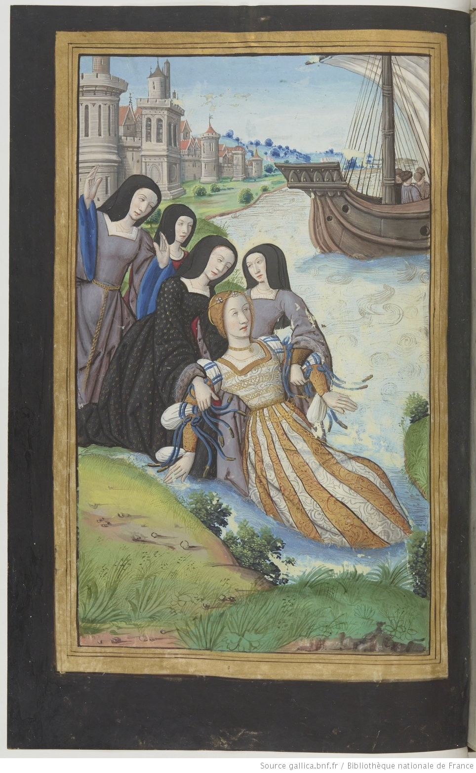 Phyllis abandonnée par Démophon, un des fils de Thésée. Miniature extraite des Héroïdes d'Ovide (traduction d'Octavien de Saint-Gelais, 1496-1498).